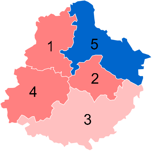 Résultats des élections législatives de la Sarthe en 2012